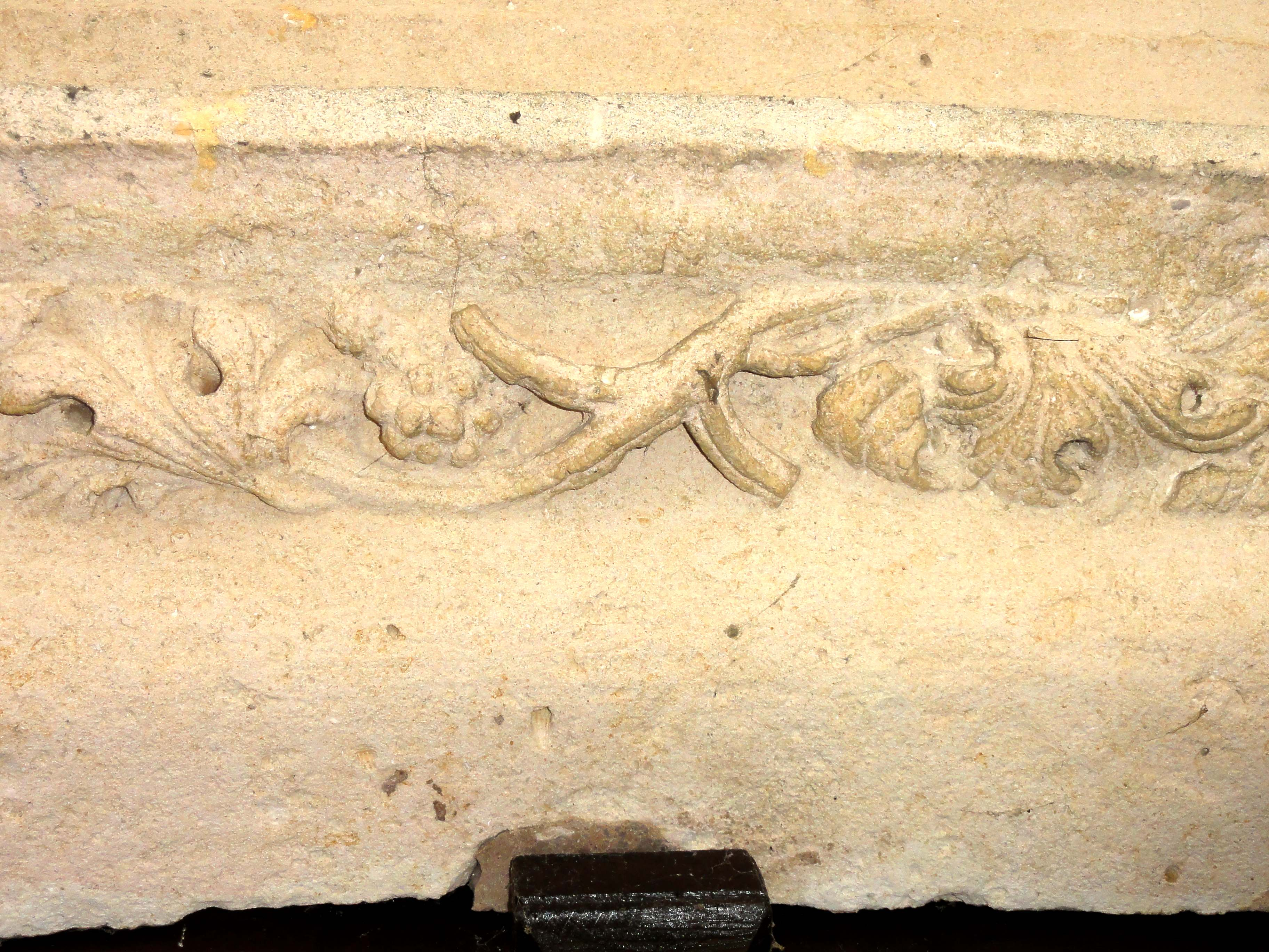 Église Saint-Georges de Ronquerolles - voir titre.